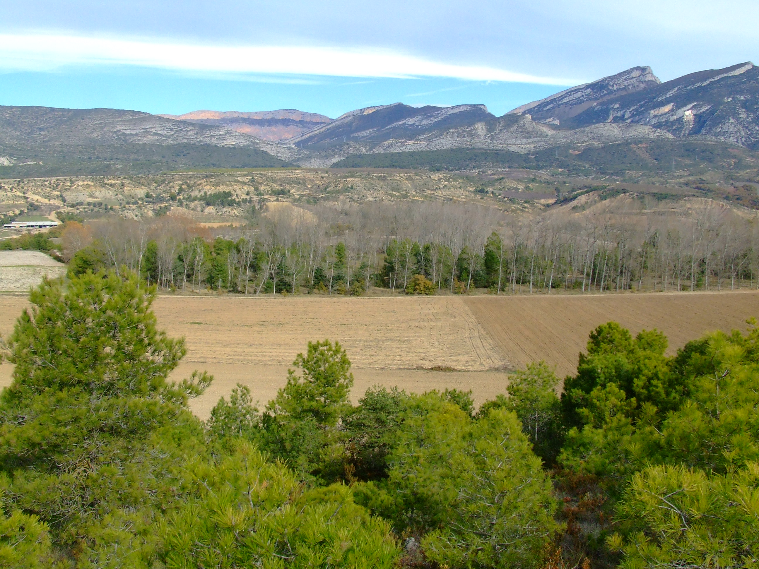 L'Estany Gros de Basturs (Orcau, Isona i Conca Dellà, Pallars Jussà)